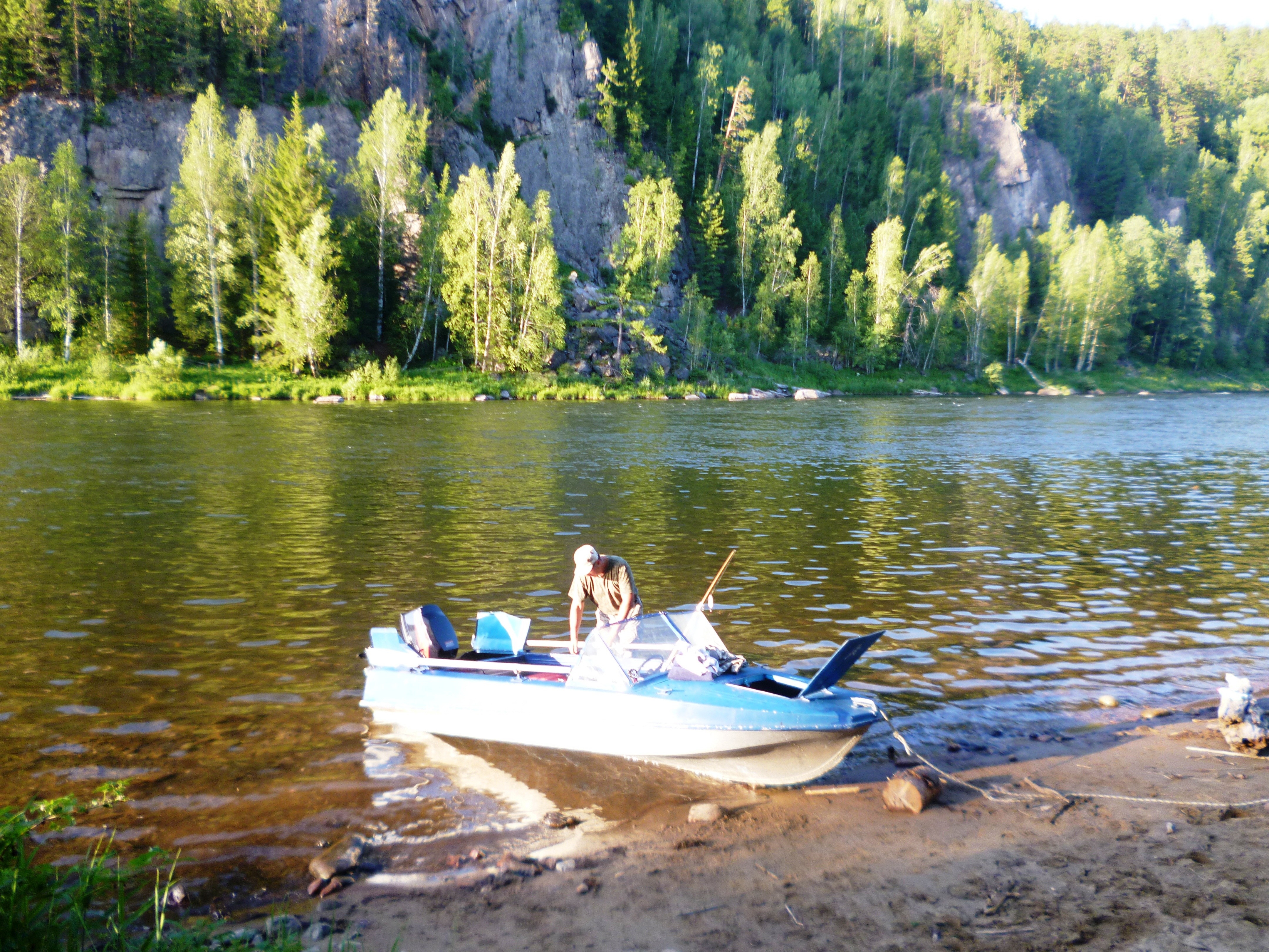 рыбалка на Агуле